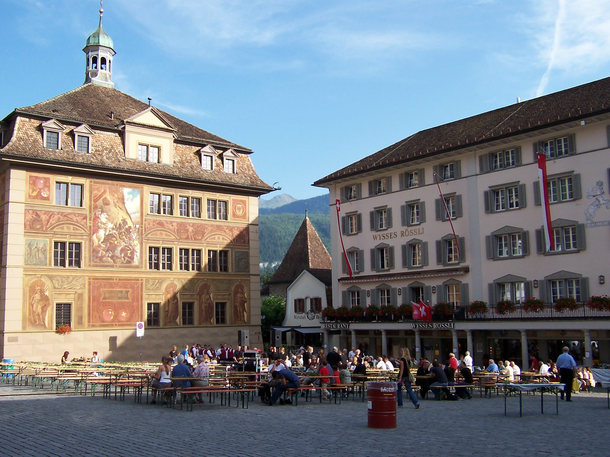 Schwyz, Hauptplatz: Rathaus und Wysses Rössli